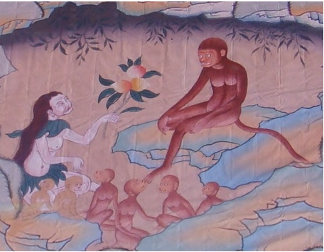 пхатрэлген